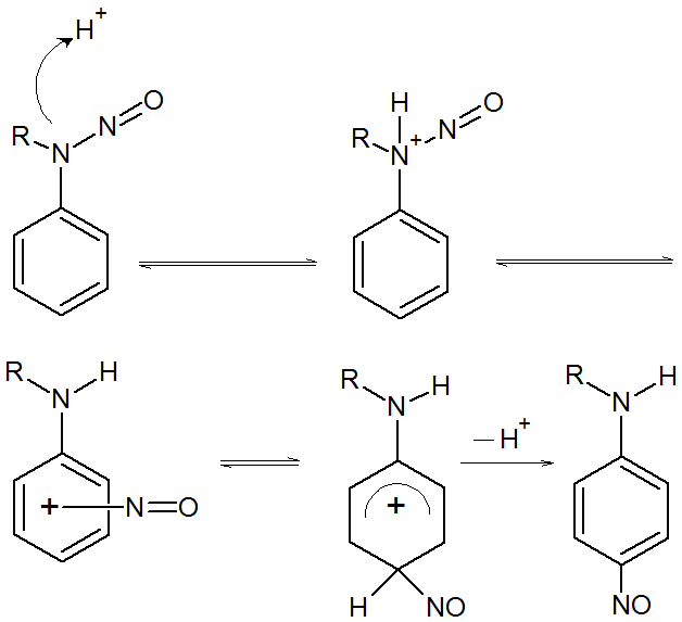 Mechanism of Fischer–Hepp rearrangement If this file is eligible for relicensing, it may also be used under the Creative Commons Attribution-ShareAlike 3.0 license. The relicensing status of this image has not yet been reviewed. You can help.